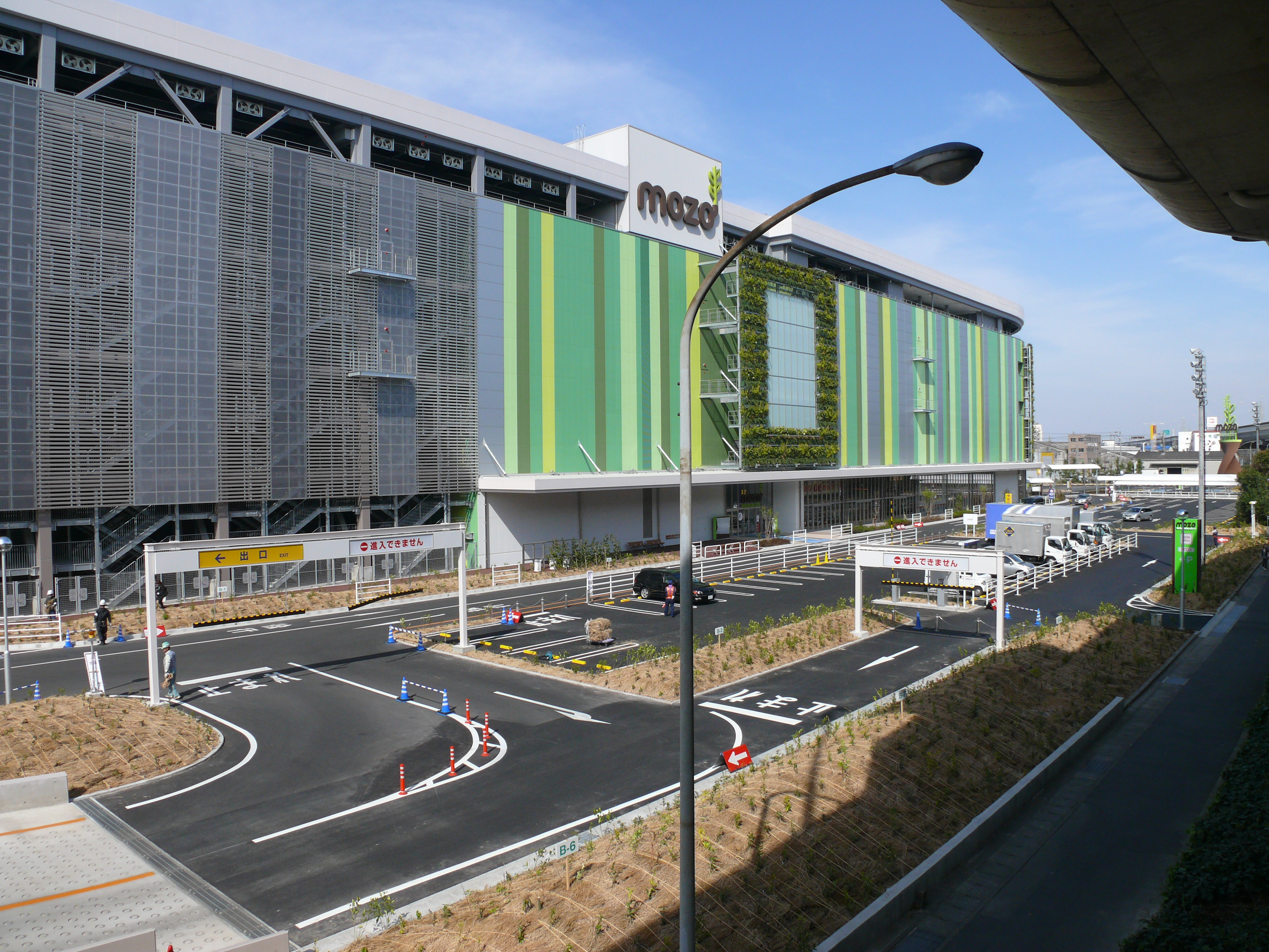 イオングループのショッピングセンター「MOZO（モゾ）ワンダーシティ（旧イオンモール名古屋ワンダーシティ」